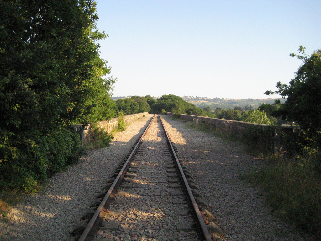 Viaduc de la Lande ou de Clécy : pont ferroviaire à voie unique franchissant l'Orne à Clécy